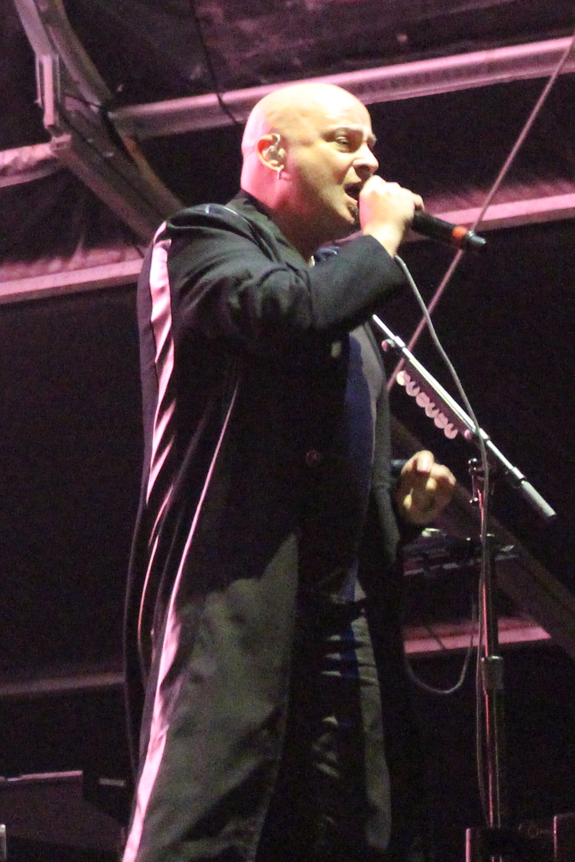 Festivalsommer This photo was created with the support of donations to Wikimedia Deutschland in the context of the CPB project "Festival Summer". Personality rights warningAlthough this work is freely licensed or in the public domain, the person(s) shown may have rights that legally restrict certain re-uses unless those depicted consent to such uses. In these cases, a model release or other evidence of consent could protect you from infringement claims.